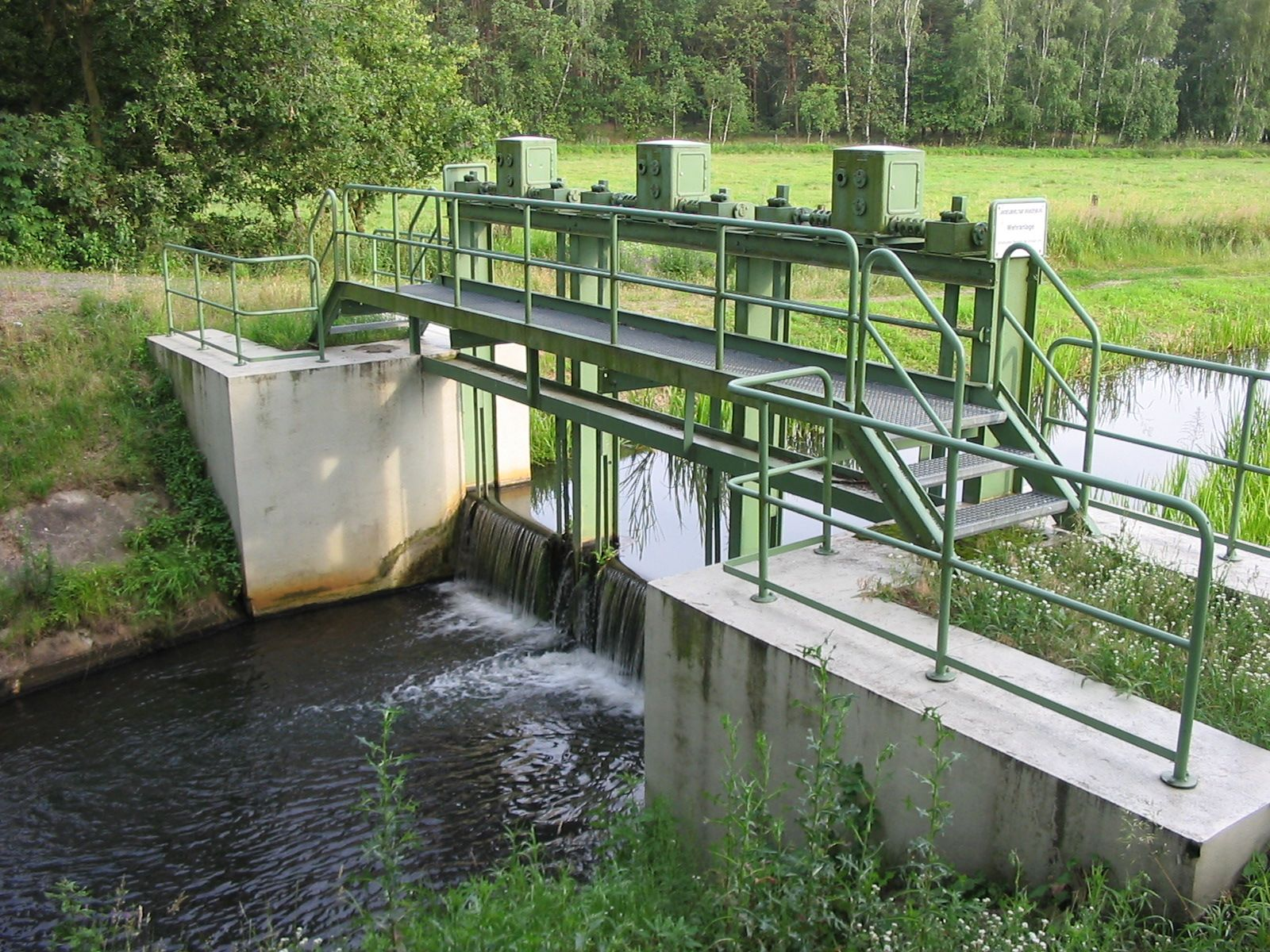 Ein Wehr am Königsgraben (ein Seitenkanal der Nuthe) in der Umgebung von Luckenwalde. Die Erstellung von Kanälen, wie dem Königsgraben, und der Bau von Wehren an der Nuthe und dem Königsgraben sind meliorative Maßnahmen zur Verringerung der Wahrscheinlichkeit von Hochwassern der Nuthe.